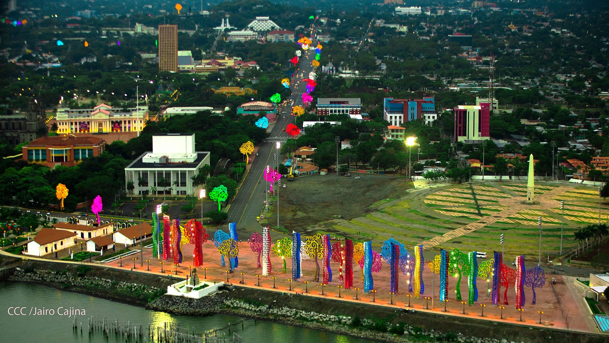 Avenida ubicada cerca del Centro Histórico de Managua donde esta la Catedral Santiago De Managua, Palacio Nacional, Asamblea Nacional, Y Otros Edificios Representativos De Managua.